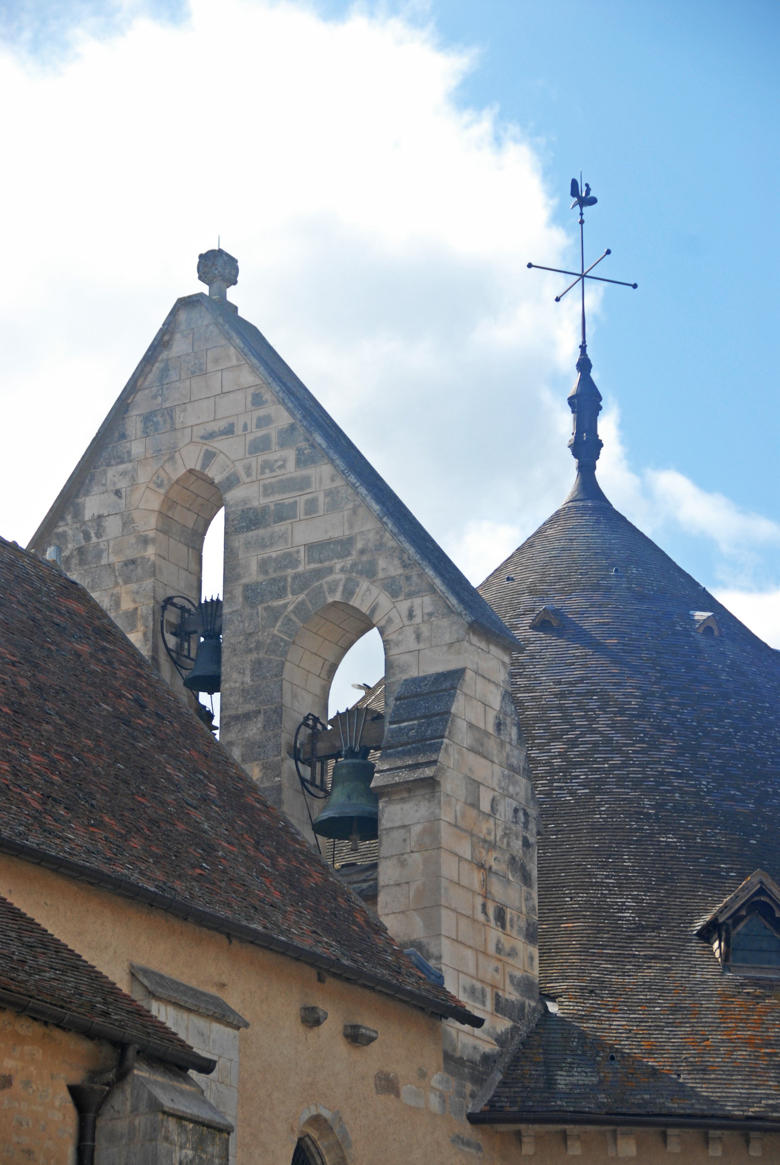 Neuvy_St.-Sépulcre, Stiftskirche, Glockenturm von O